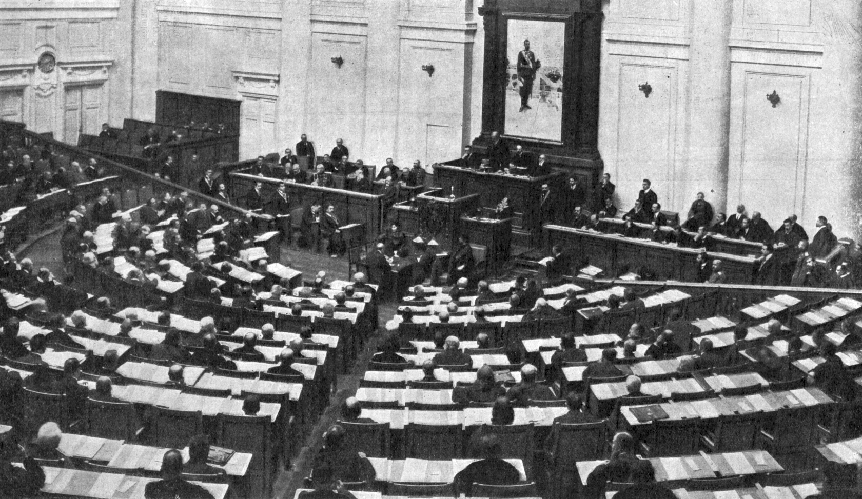 Открытие последней сессии 3-й Государственной Думы Российской империи. Приветственная речь председателя Думы Родзянко М.В. На председательской трибуне слева от стоящего М.В. Родзянко - товарищ председателя князь В.М. Волконский; справа - М.Я. Капустин; сзади - Я.В. Глинка. На секретарской трибуне (ниже президиума) секретарь М.П. Сазонович. На министерской скамье, в первом ряду, ближе к трибуне - председатель Совета министров В.Н. Коковцов; рядом с ним обер-прокурор священного синода - В.К. Саблер; далее - военный министр В.А. Сухомлинов; министр юстиции И.Г. Щегловитов и государственный контролёр П.А. Харитонов. Во втором ряду, сзади В.К. Саблера, опершись на руку, сидит министр народного просвещения Л.А. Кассо. Прислонившись к президентской трибуне, в цепи, - пристав Государственной Думы И.Е. Лазо. В проходе справа - начальник охраны Таврического дворца полковник барон В.Ф. Осен-Сакен.